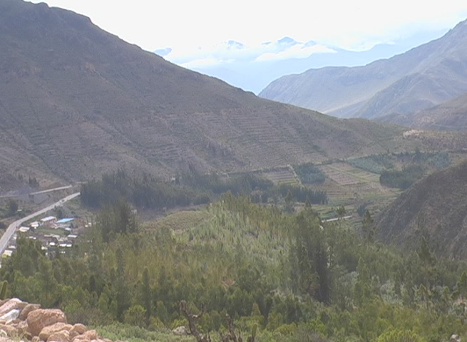 Vista del valle del río Estique en Estique Pampa.